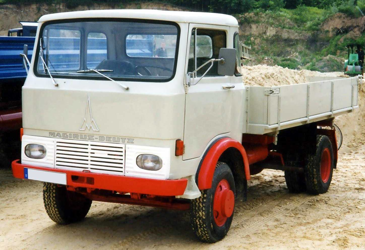 Lkw Eicher-Magirus-Deutz M80D7FK Kipper